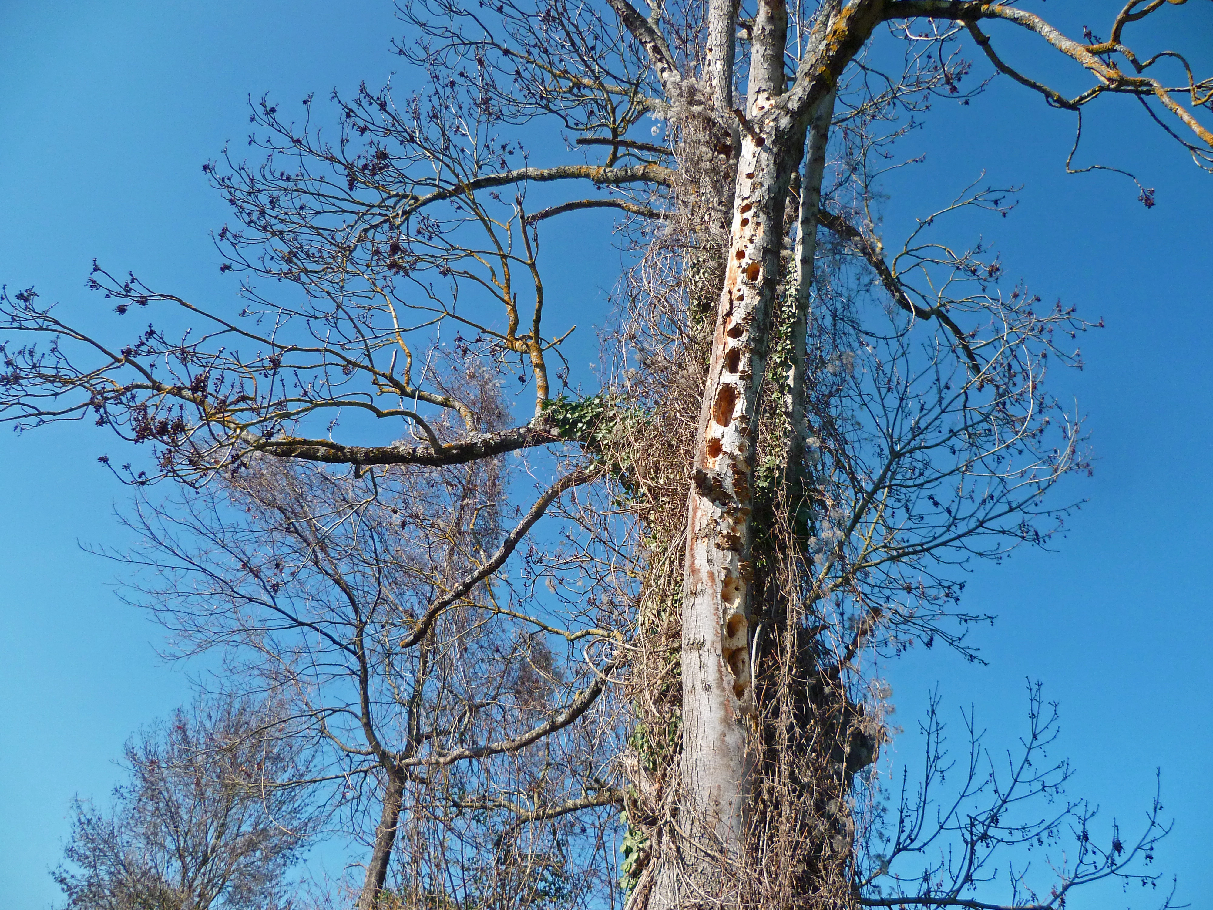 Gajan (Ariège, France) : Frêne (Fraxinus excelsior) moribond perforé par les pics.